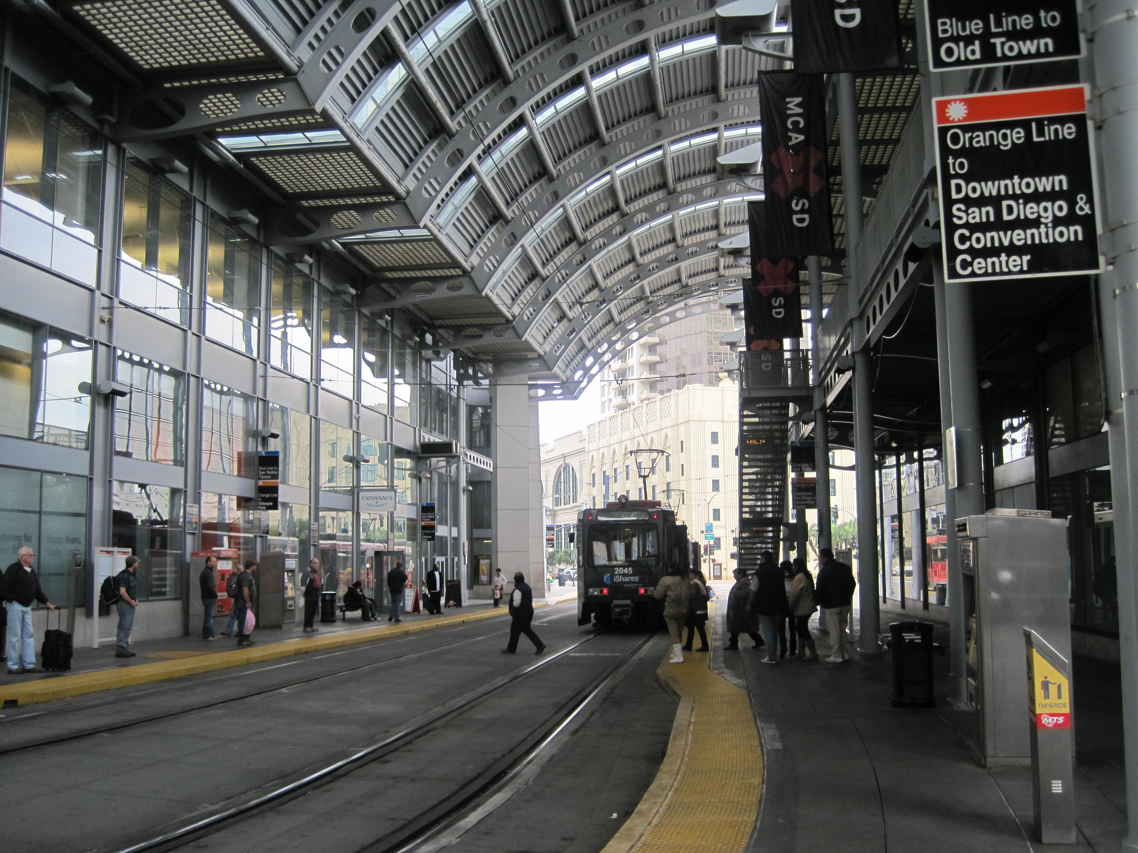 America Plaza station in San Diego, California.